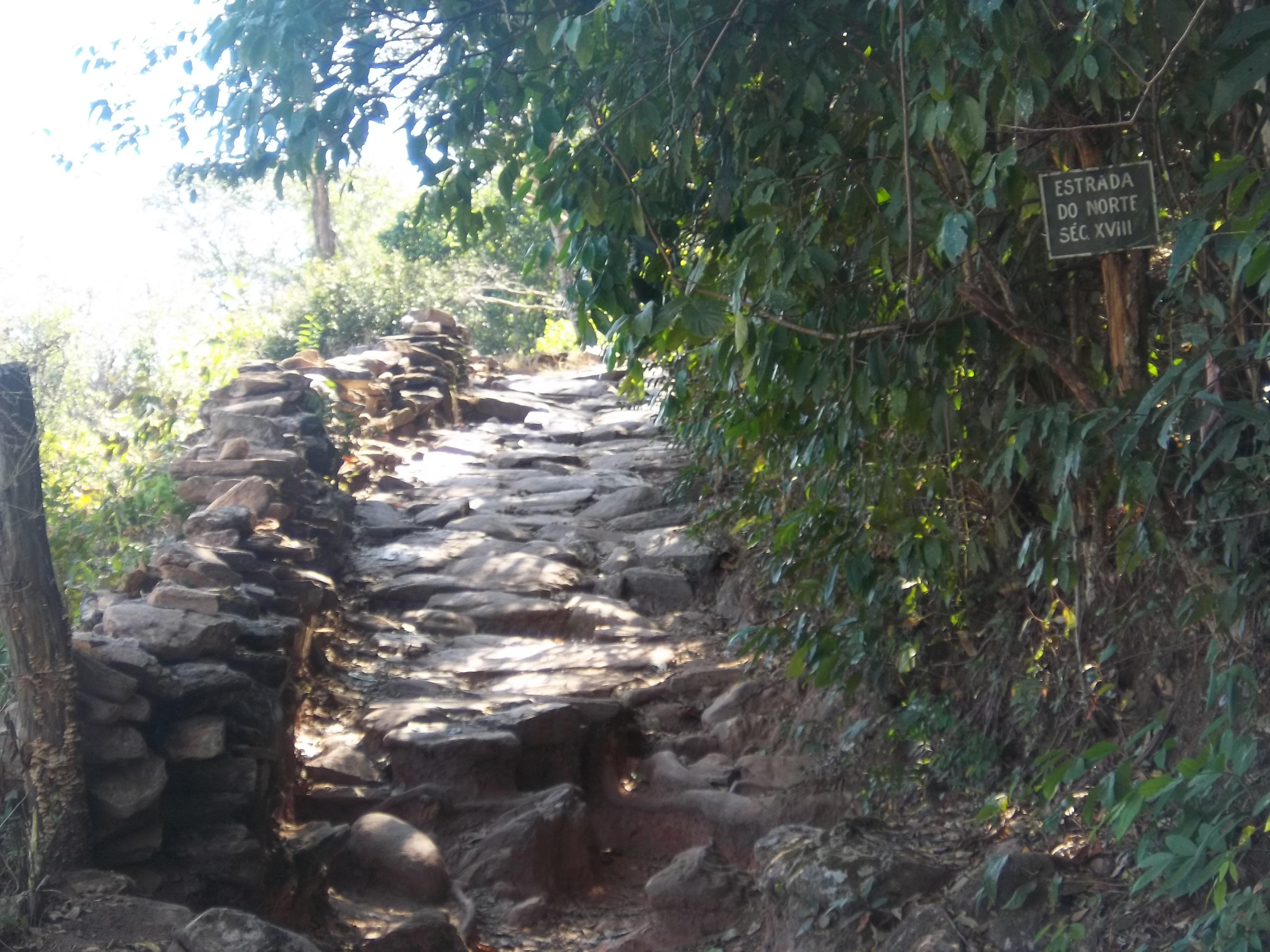 Estrada do Norte, do século XVIII, na Fazenda Bonsucesso em Pirenópolis.